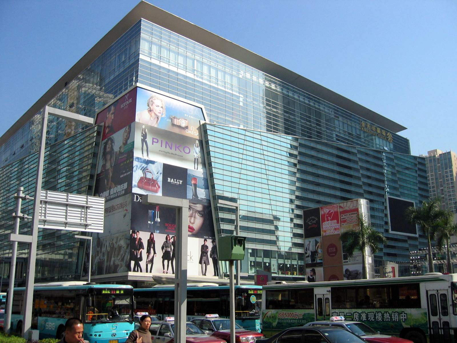 金光華廣場 Shenzhen Kingsglory Plaza, 中國 廣東省 深圳市 羅湖區 佳寧娜購物廣場 人民南路 2028號